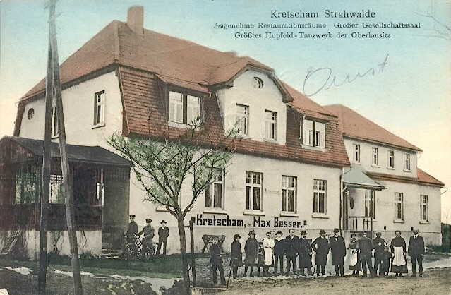 Kretscham Strahwalde von Max Besser. Kolorierte schwarz-weiß Fotografie als Postkarte.Anmerkung: Bei dem auf der Karte angegebenen „Hupfeld-Tanzwerk“ handelte es sich um ein mechanisches Musikwerk der Leipziger Hupfeld Musikinstrumentenwerke von Ludwig Hupfeld.